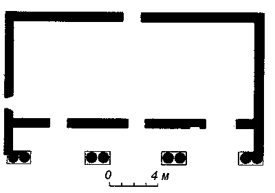 Схема складів